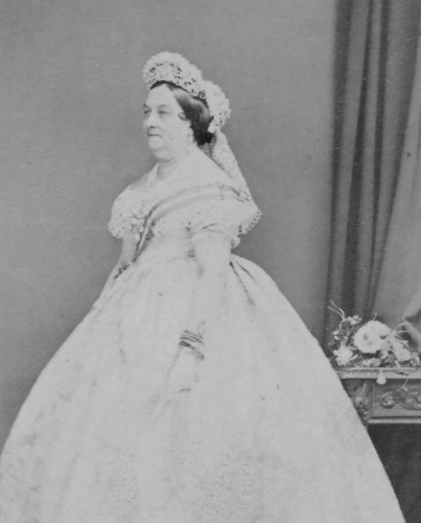 Баронесса Шарлотта Адамовна Бруннов (1801—1874)